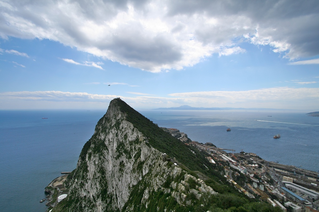 Gibraltar